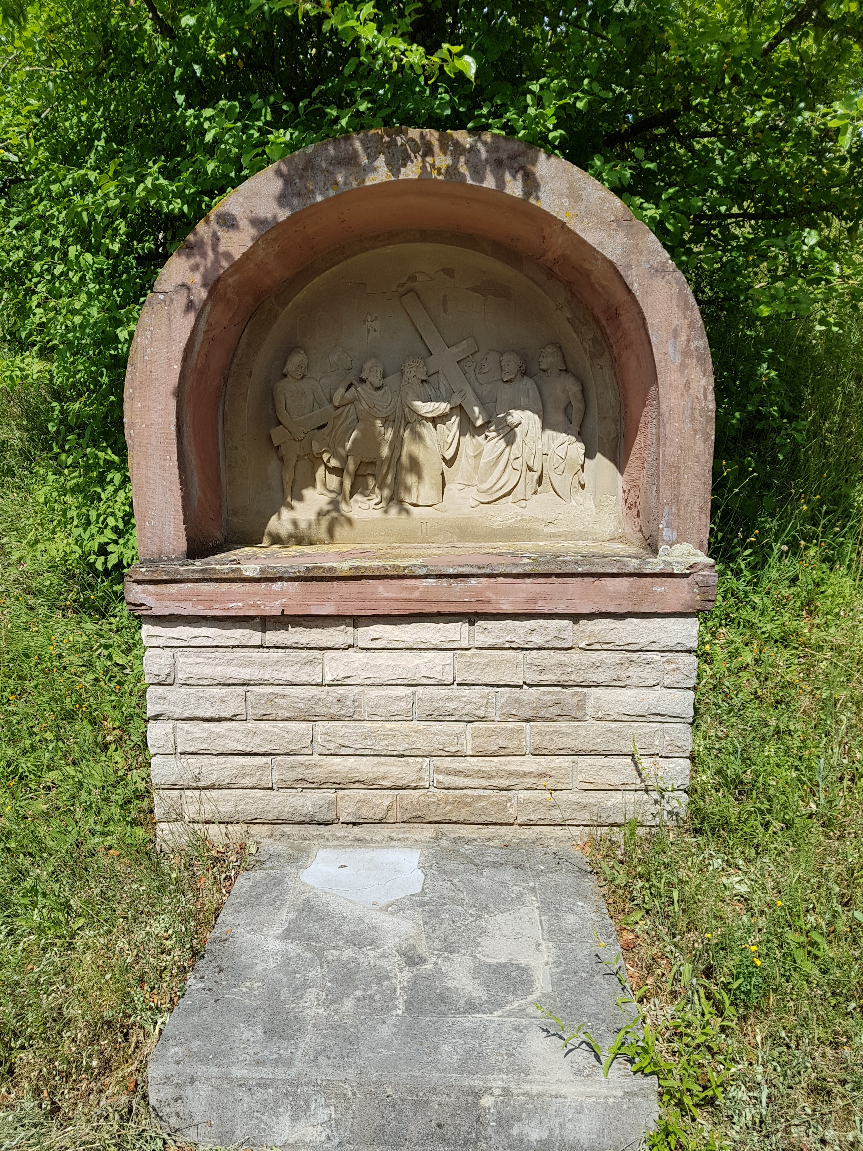 Kreuzweg zur Dittwarer Kreuzkapelle am Kreuzhölzle Bilder hochkant